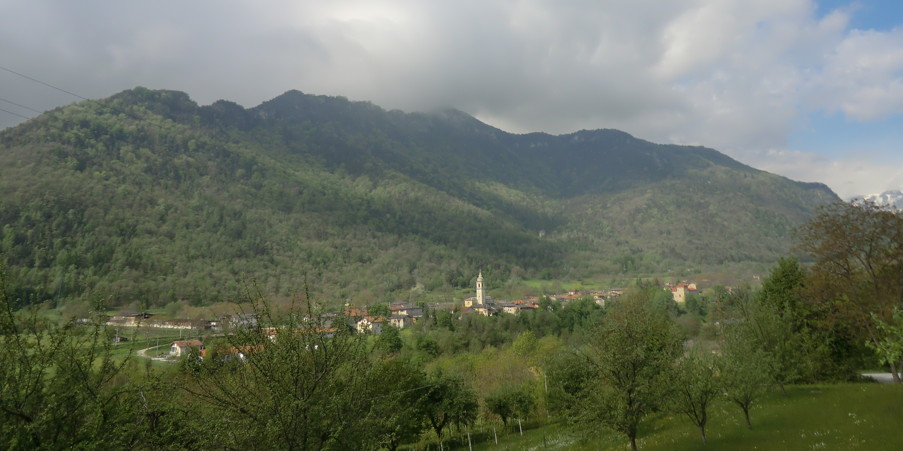 Cartignano (Cuneo): panorama